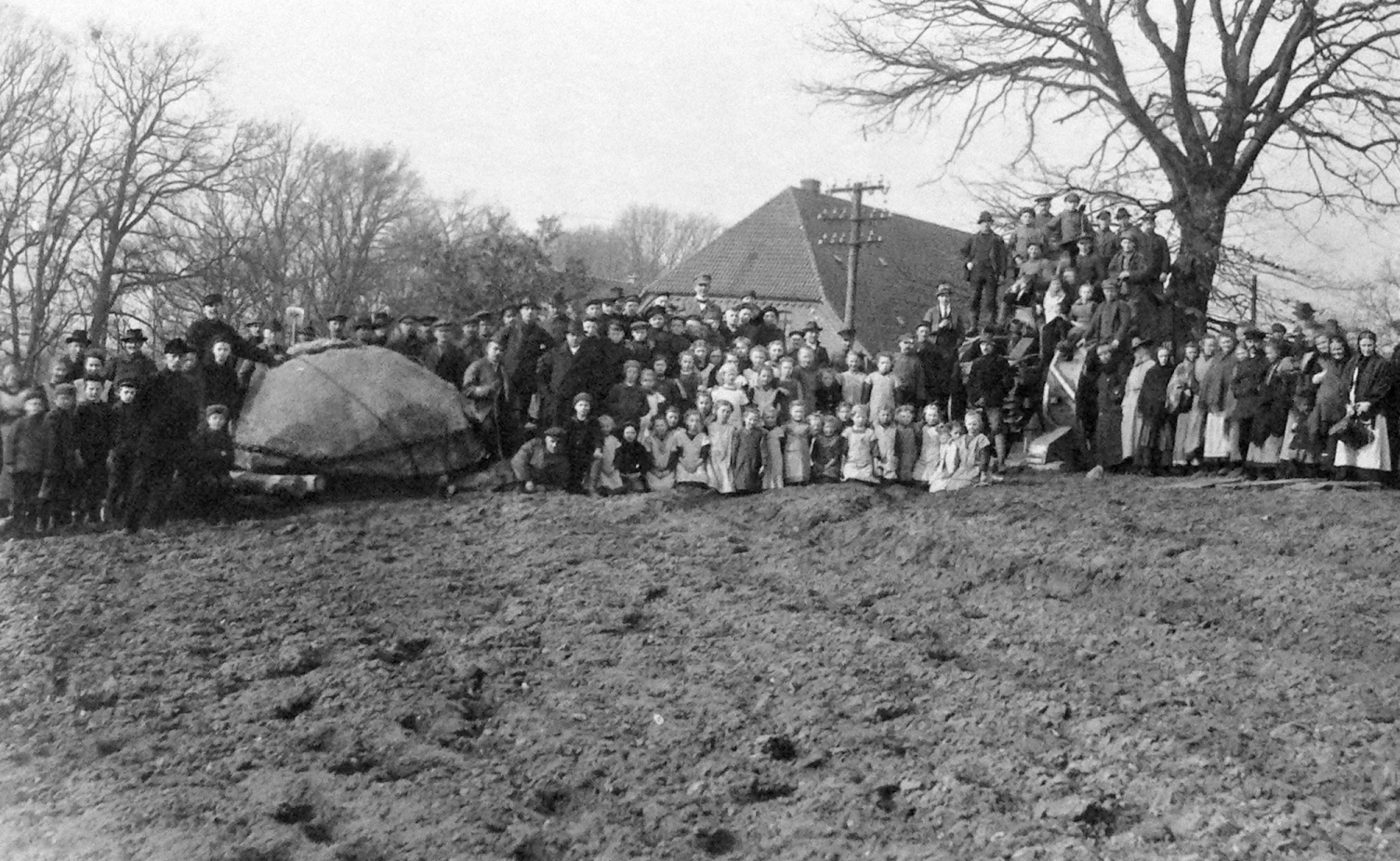 Linsburg Findlingsbergung um 1920, Verbringen des Findlungs aus dem Großsteingrab im Grinderwald ins Dorf als Kriegerdenkmal nach dem Ersten Weltkrieg